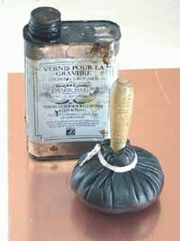 Intaglio printmaking - Hard ground